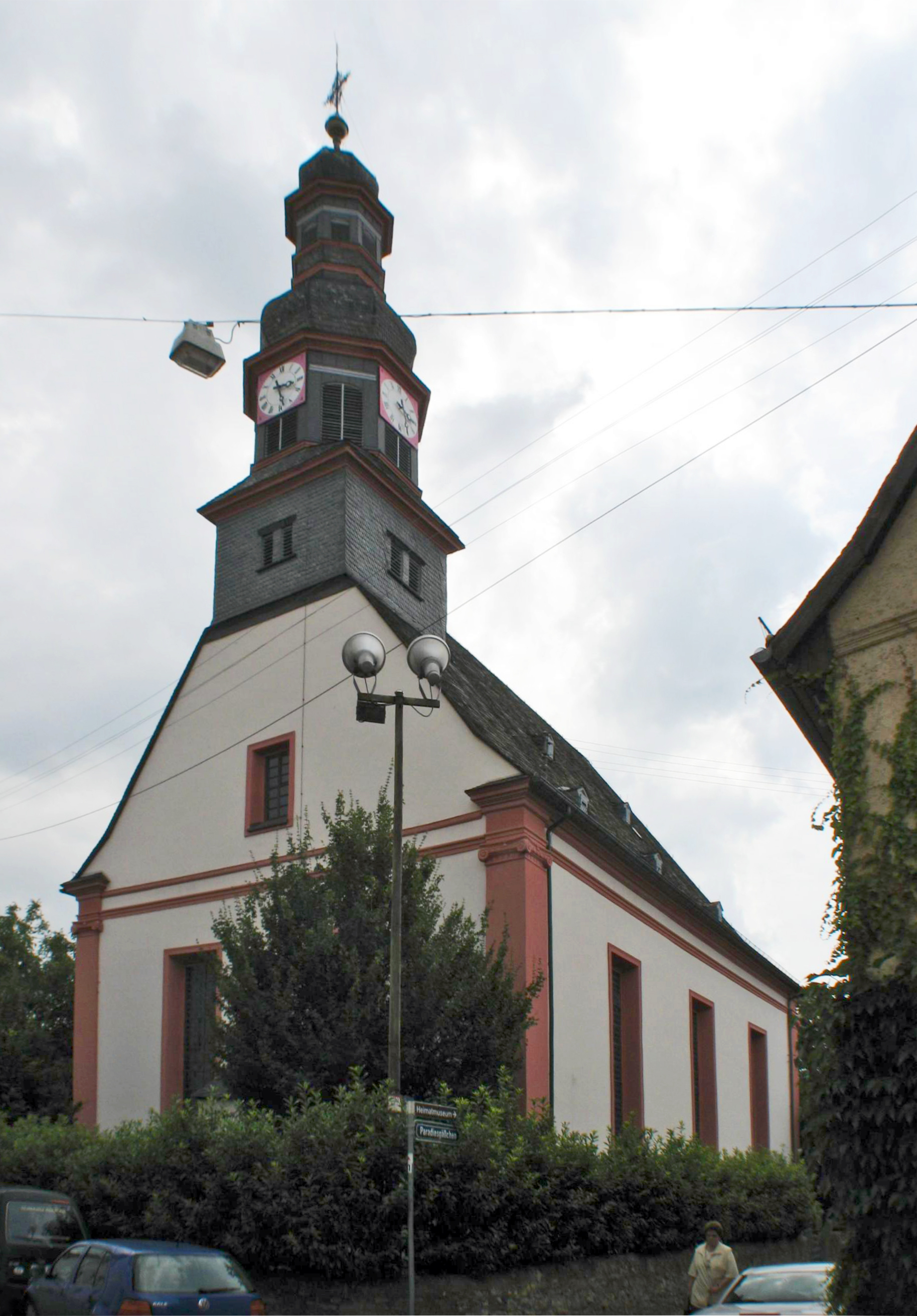 Christophoruskirche in Schierstein, Wiesbaden, erbaut